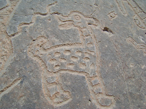 Foto tomada en el complejo arqueológico de Toro Muerto en el valle de Majes